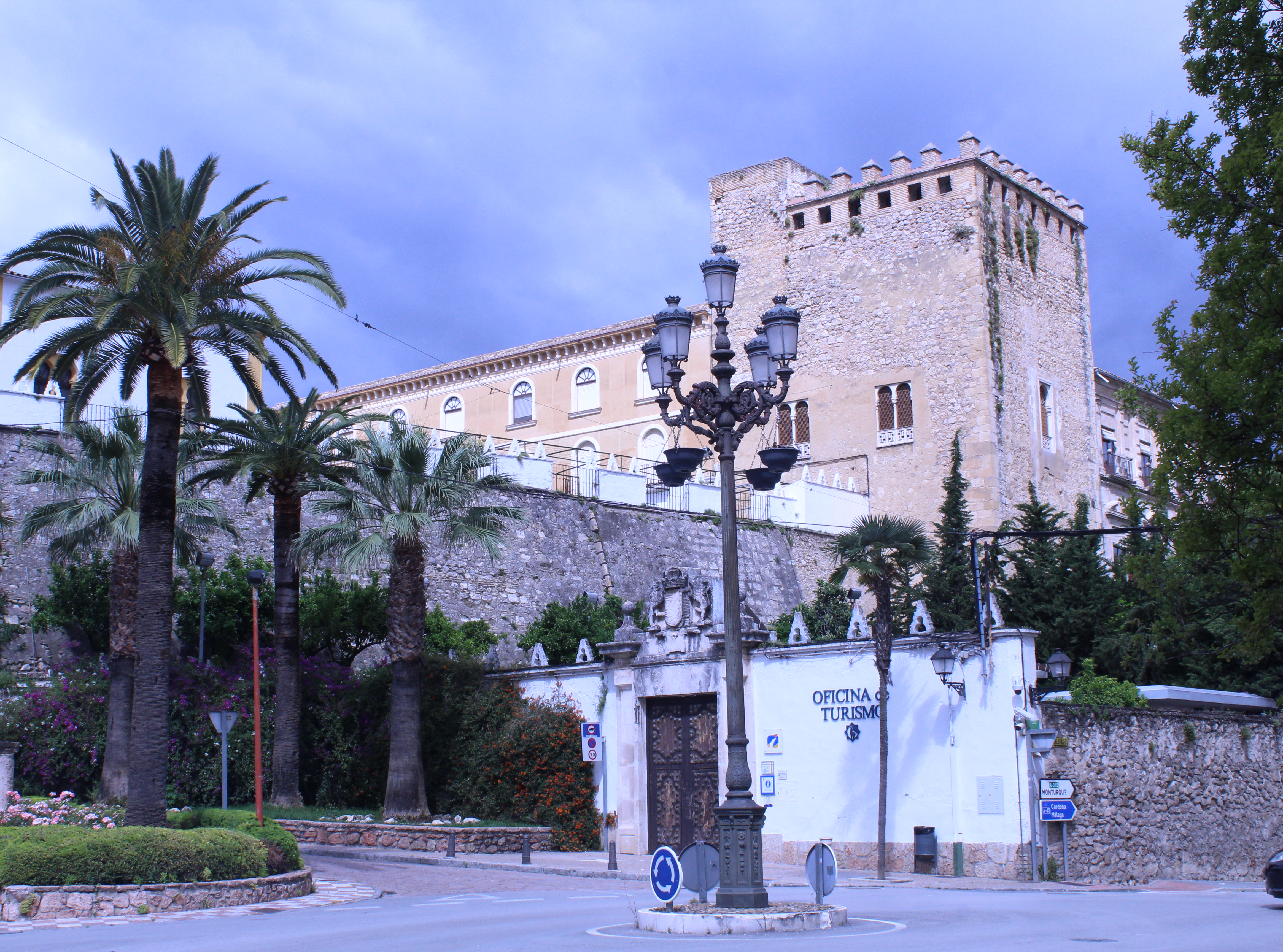 Vista del castillo de Cabra